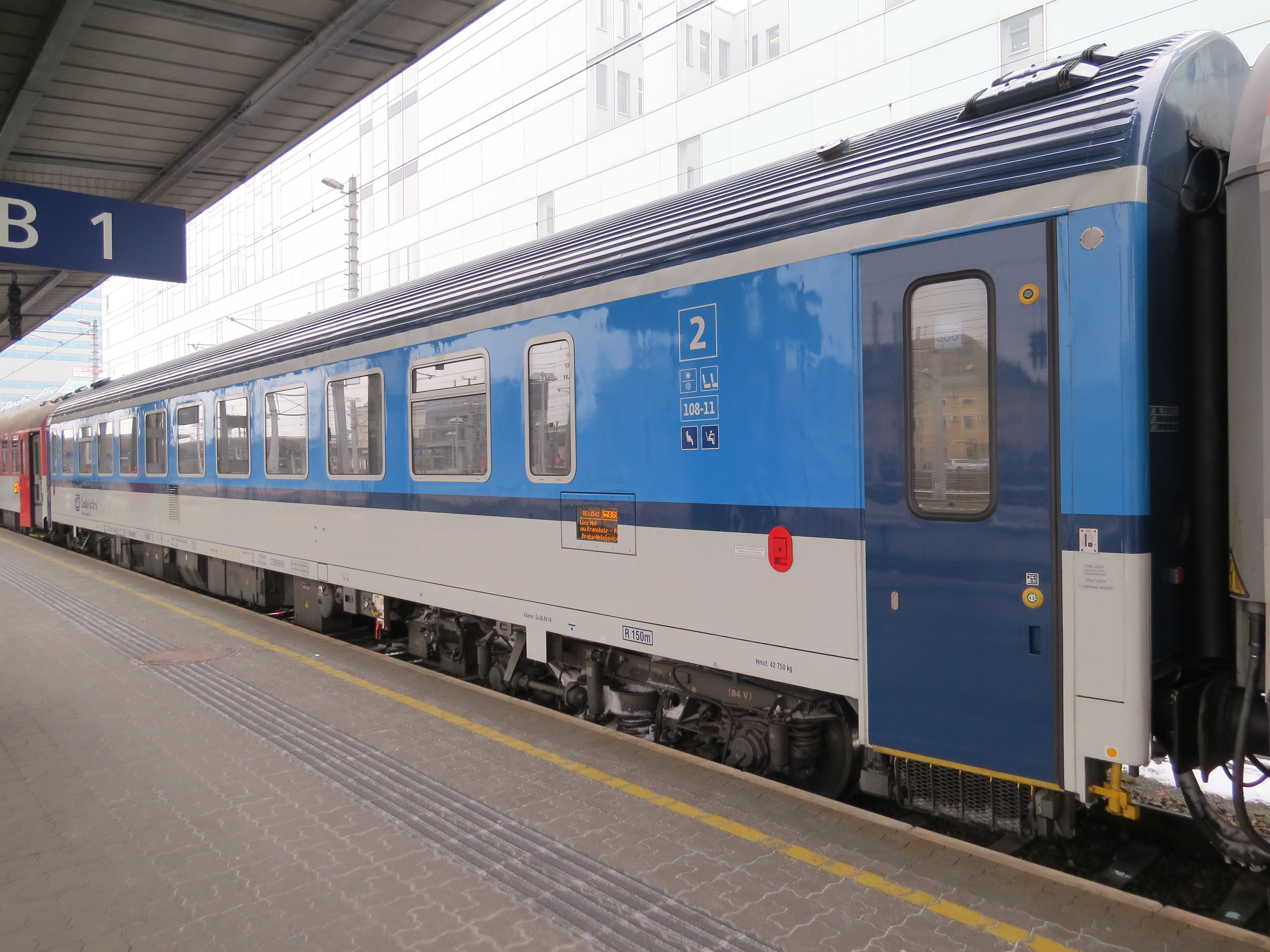 Frankenfels - Südböhmen